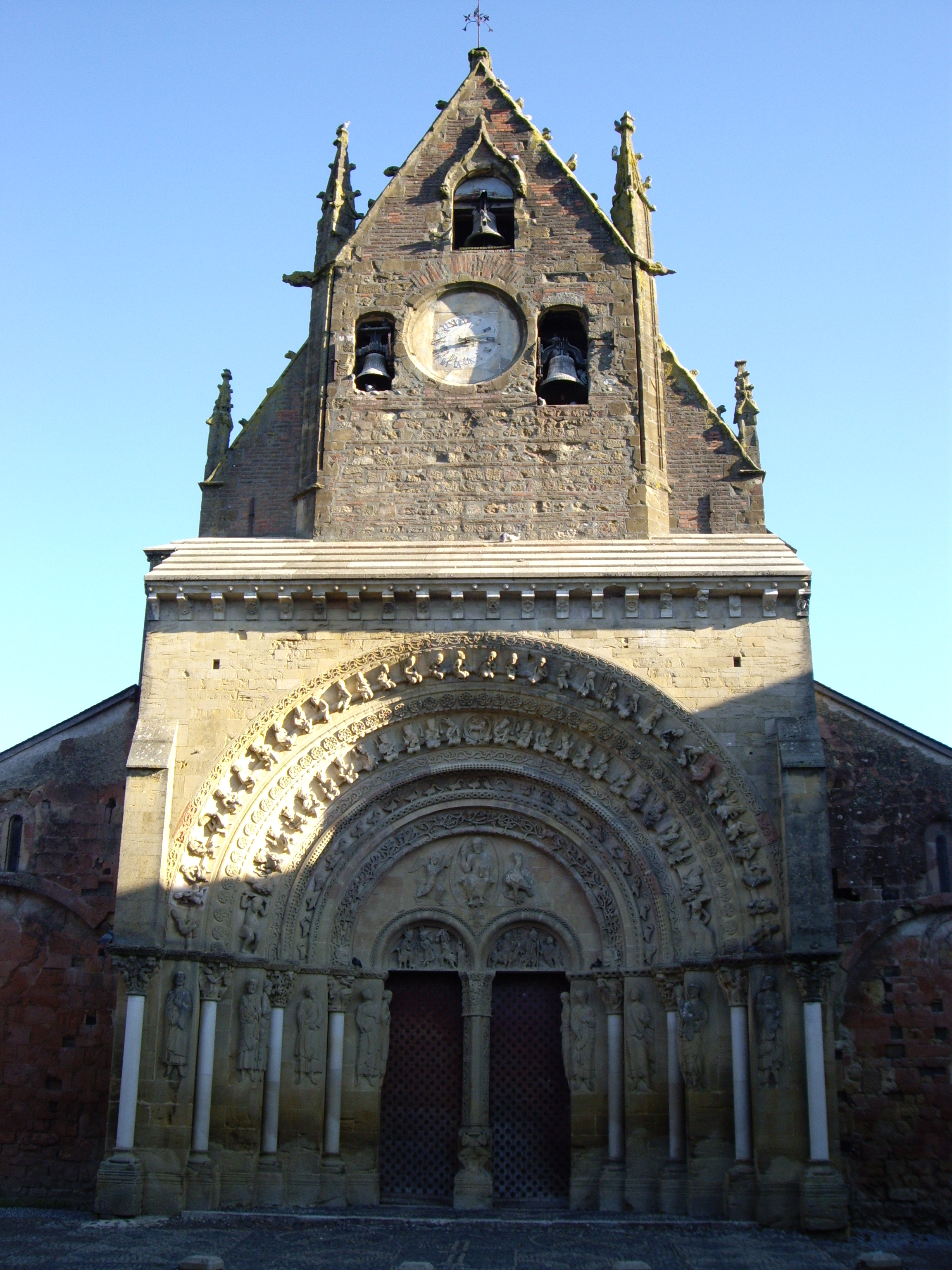 Église Sainte-Foy de Morlaàs (64)